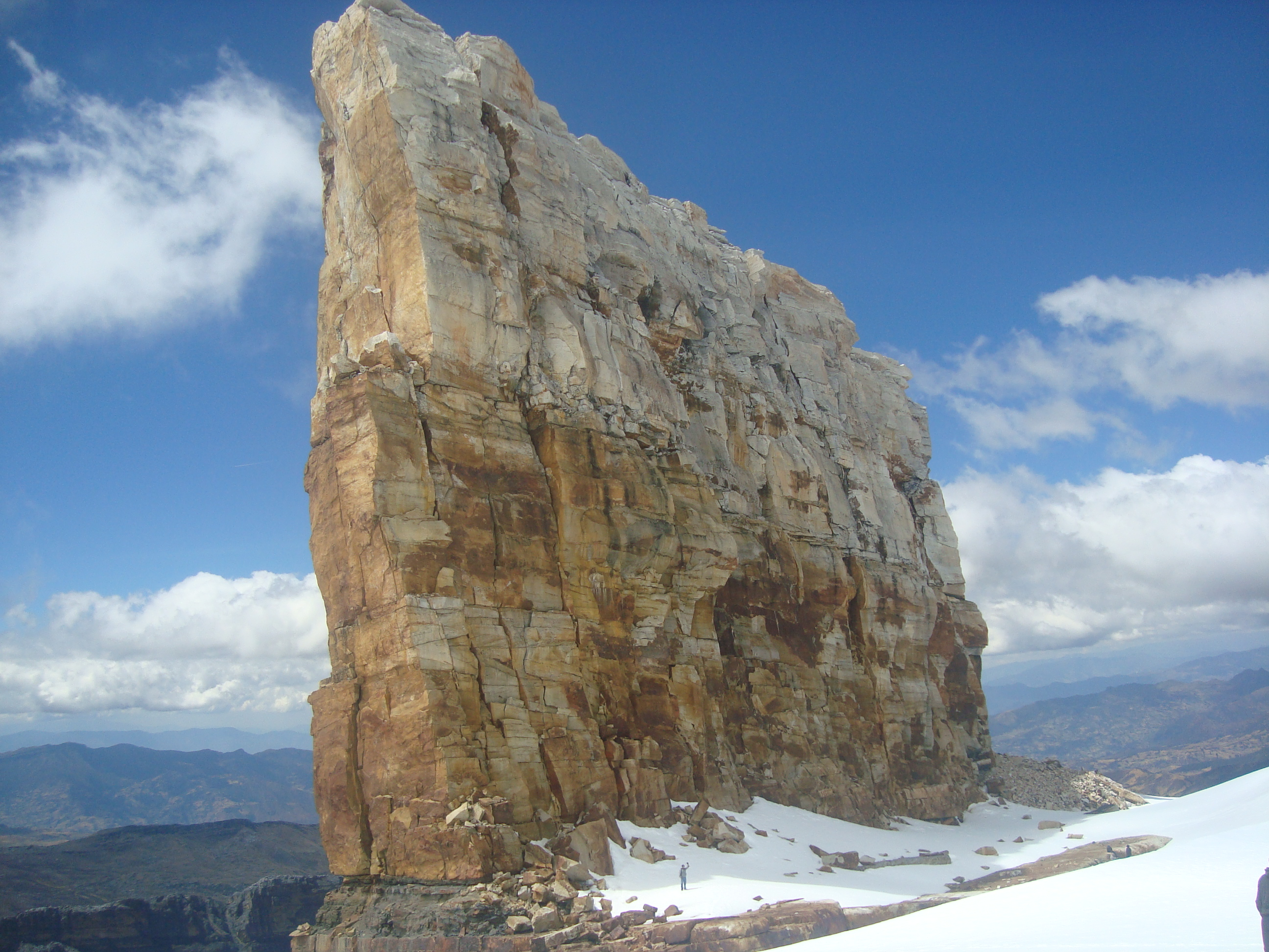 VISTA DEL PULPITO DEL DIABLO UBICACION ENTRE LA ROCA Y EL PICO PAN DE AZUCAR. Esta fotografía fue tomada en un área protegida de Colombia con el código 82 del RUNAP.